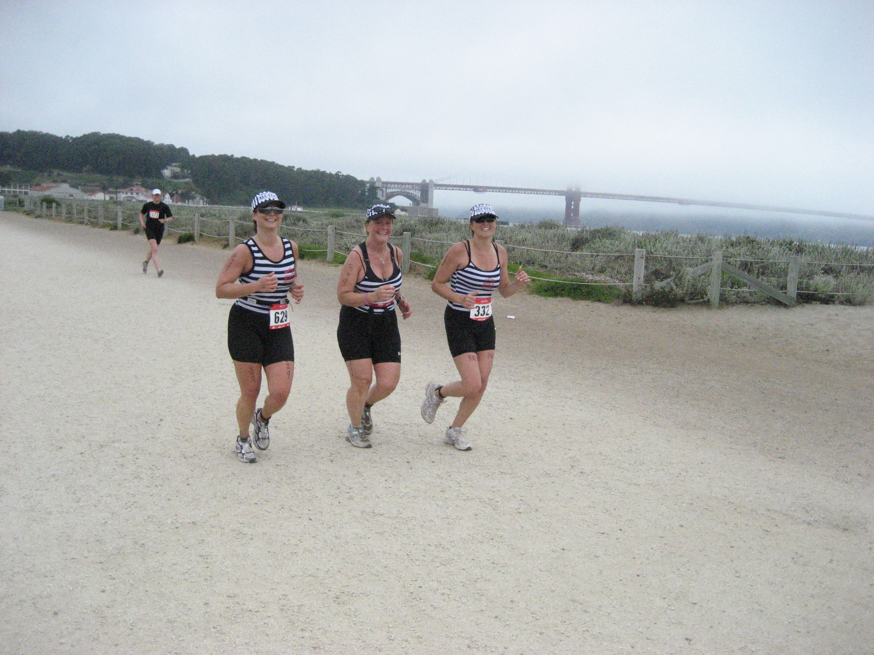 Escape from Alcatraz